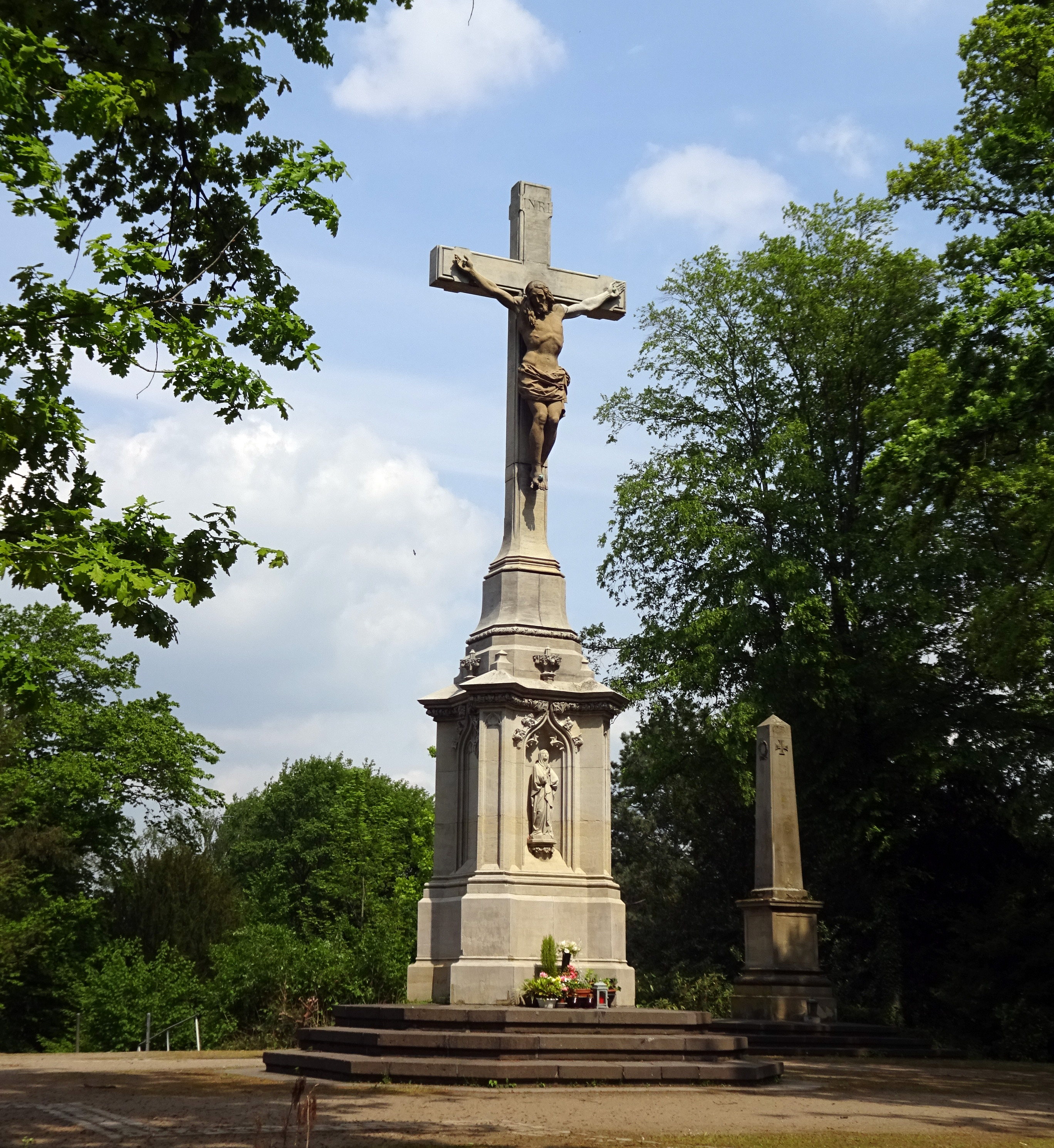 Das Hochkreuz auf dem „Millionenhügel“ Nordfriedhof Düsseldorf. Das rund 12 Meter hohe Hochkreuz aus den Jahren 1850/1851 stand ursprünglich in der Mittellage des Golzheimer Friedhofs, also genau dort, wo heute die Klever Straße verläuft, und wurde 1905 von dort auf den Nordfriedhof übertragen. Architektonischer Entwurf kam von Johannes Kühlwetter, von Dietrich Meinardus wurde das Kreuz bildhauerisch ausgeführt, der Christus wurde von Johann Peter Götting und die Madonna vom Bildhauer Julius Bayerle gefertigt.